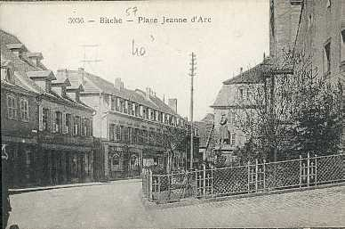 Carte postale ancienne illustrant la Place Jeanne d'Arc, avec, peu visible, la statue de Jeanne d'Arc surmontant une fontaine, statue en pied en armure cuirassier d'après l'original (1837) de la princesse Marie d'Orléans, érigée vers 1860 à coté de l'église Sainte-Catherine de Bitche puis déplacée plusieurs fois au cours du XXe siècle dans cette même commune de Moselle, Lorraine, France.[1][2] ↑ [1] ↑ [2]